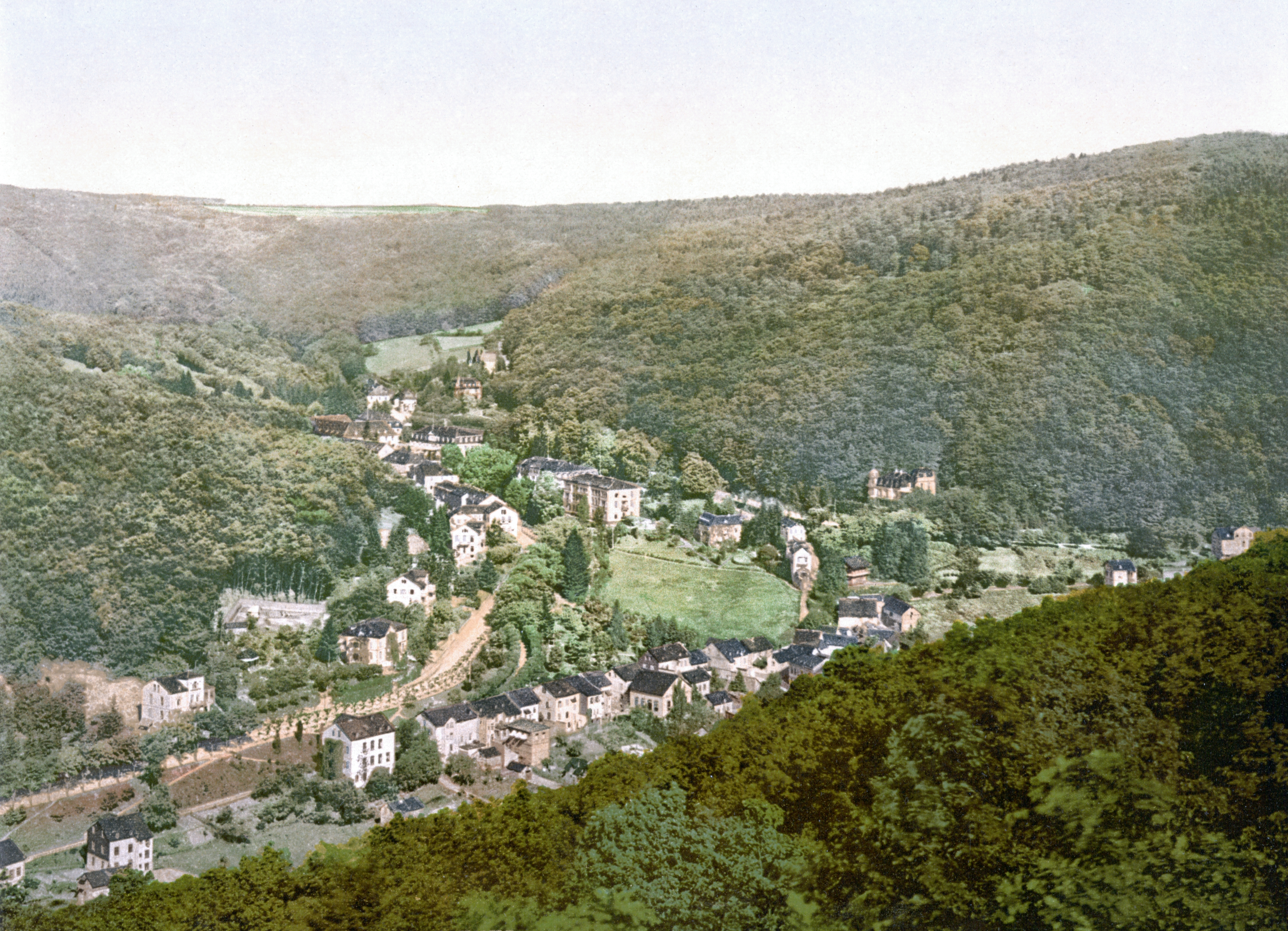 Bad Schlangenbad